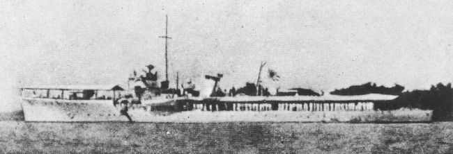 日本海軍 占守型海防艦「石垣」、撮影場所不明